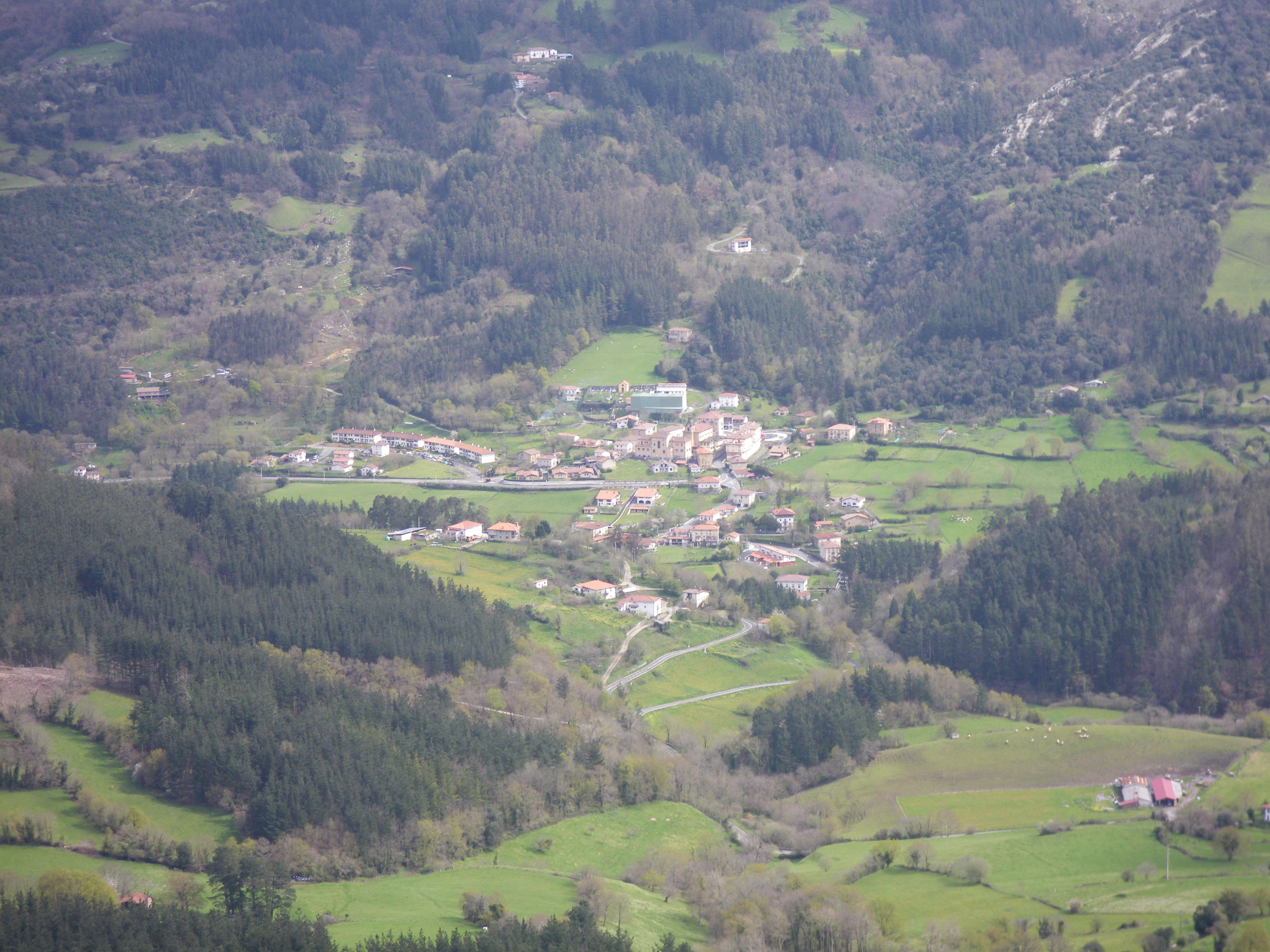 Galdameseko herria Zipar menditik ikusita, Ubieta mendilerroan kokaturik dagoena. Galdameseko San Pedro, Zubiaga eta Garai, udalerri berean dauden auzoak ikus daitezke. Galdames, Enkarterri, Bizkaia.